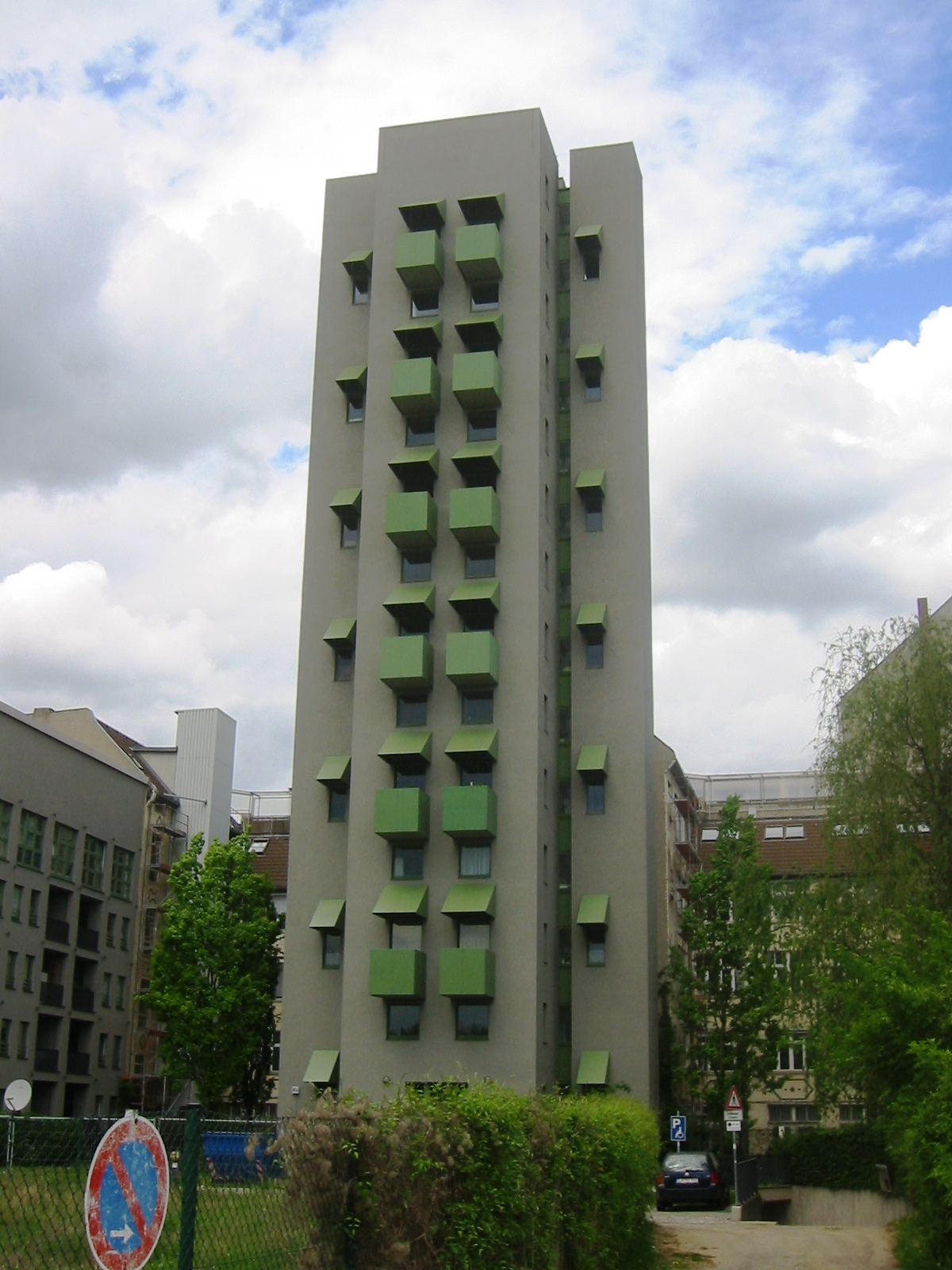 Kreuzberg Tower, entstanden zur Internationalen Bauausstellung 1984 von John Hejduk ("New York Five").